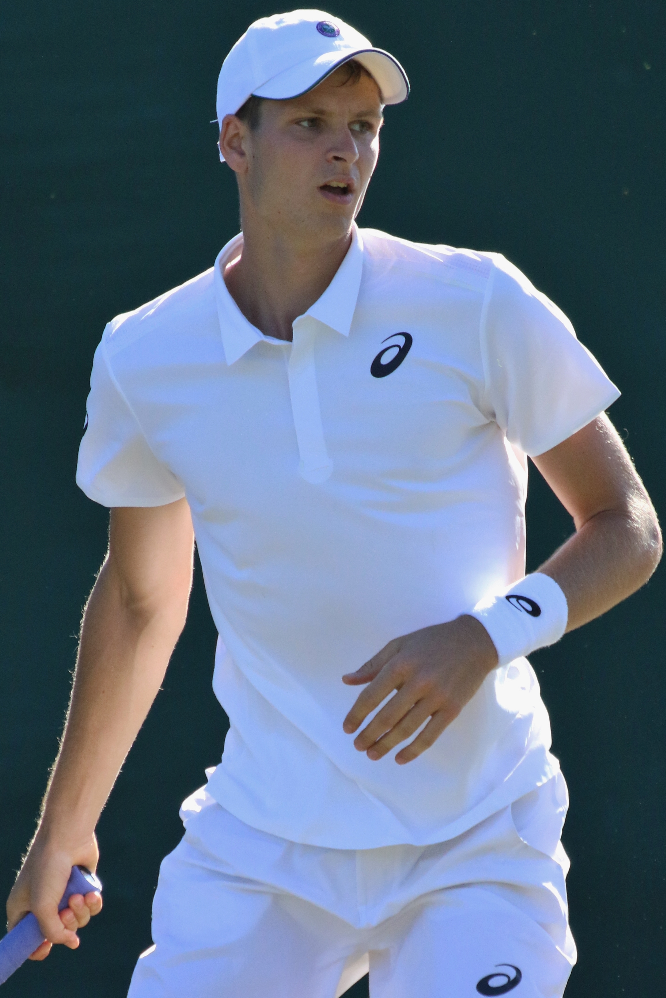 Hurkacz WMQ18 (32)